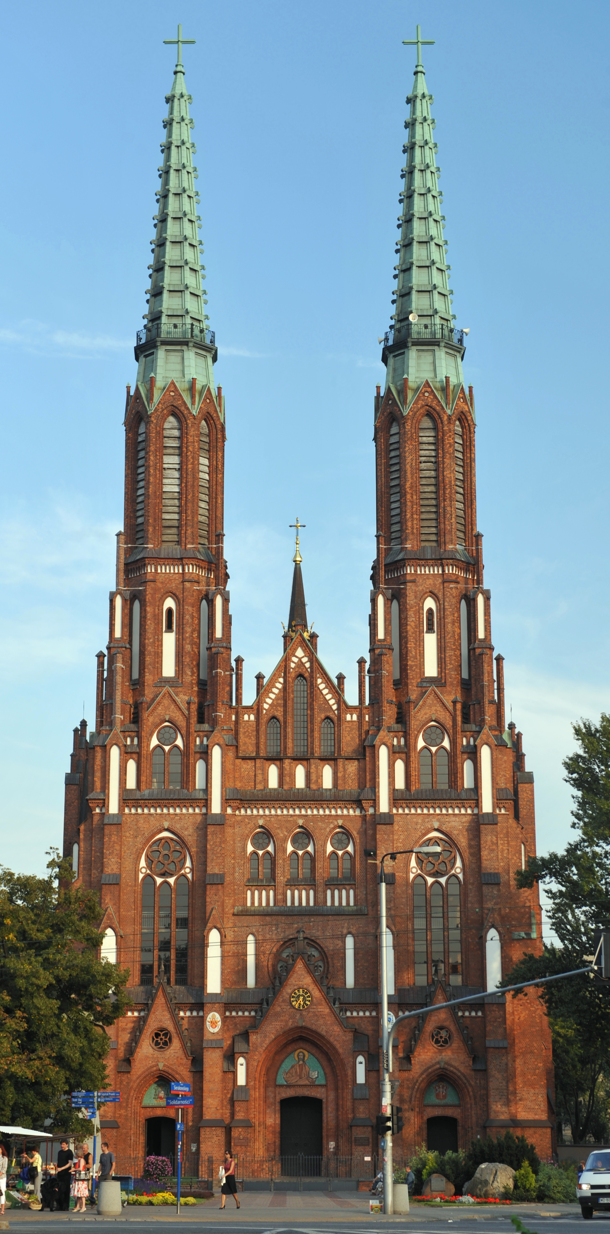 Bazylika katedralna Świętych Floriana i Michała w Warszawie.